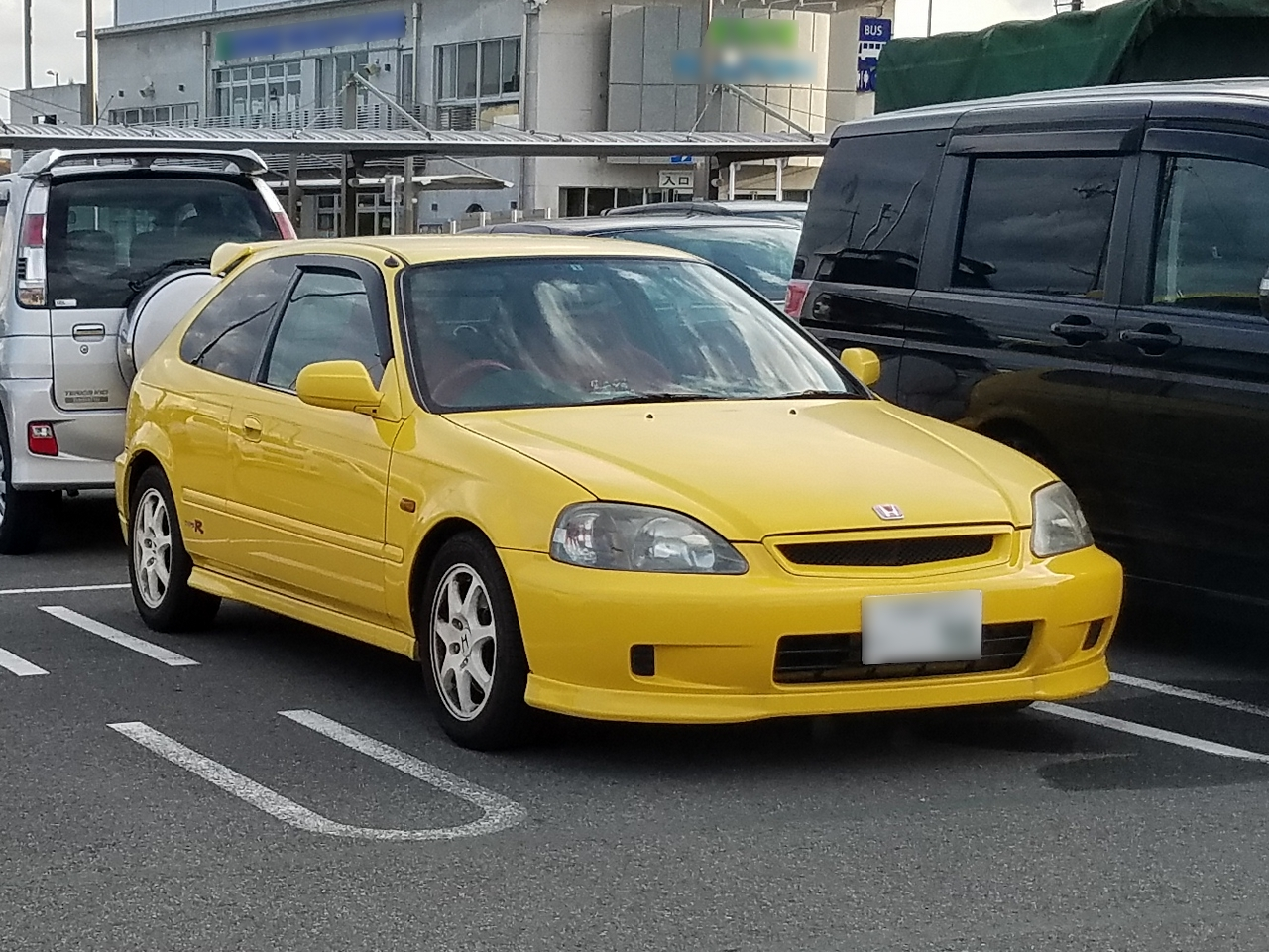 シビック タイプR（後期型）